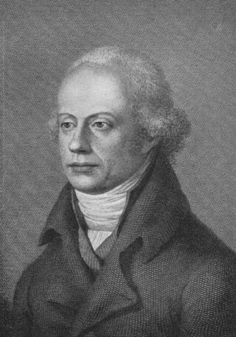 Franz Josef Gall